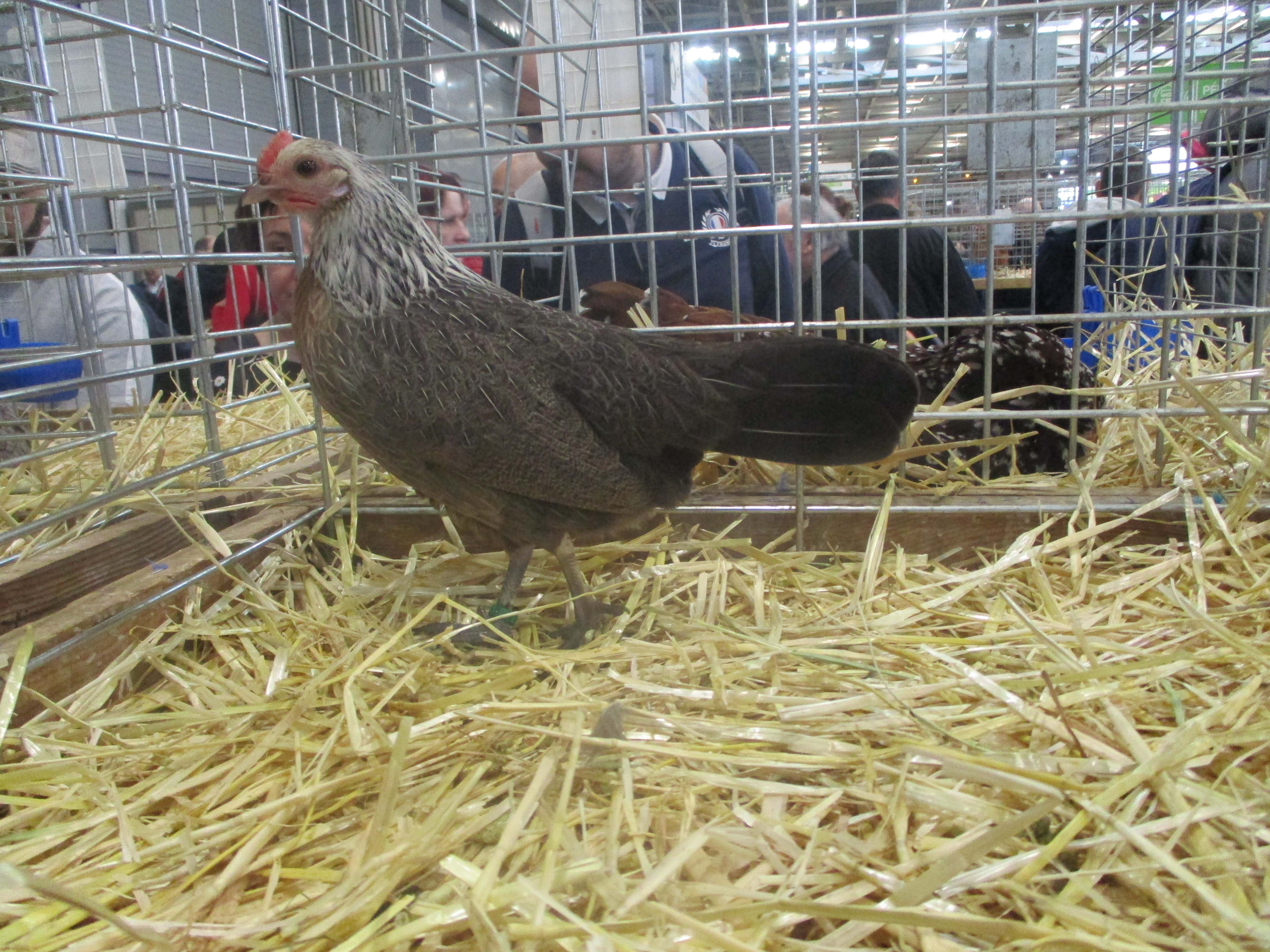 Poule ardennaise saumon argenté au SIA 2020.